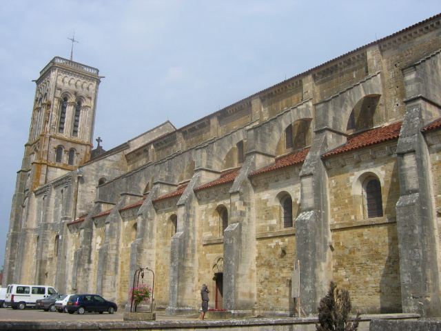 Abbatiale de Vézelay, Bourgogne, France : vue du sud